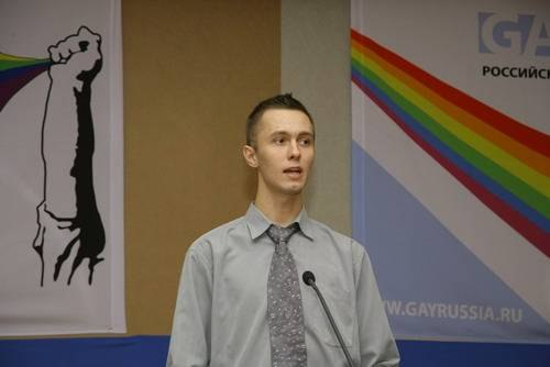 Сярней Андросенка. 5-я ЛГБТ-канферэнцыя ў Мінску.